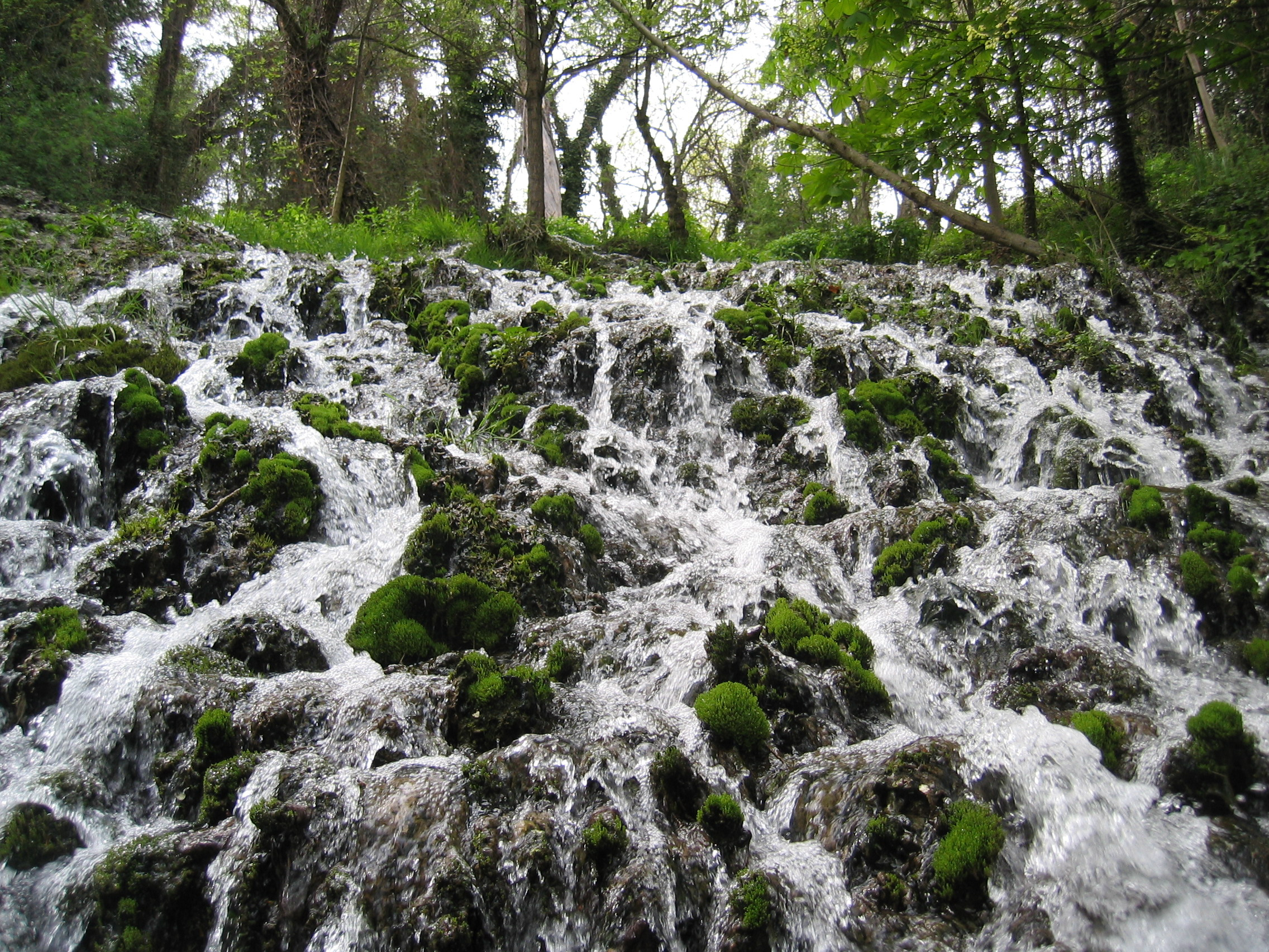 Imatges del Monasterio de Piedra